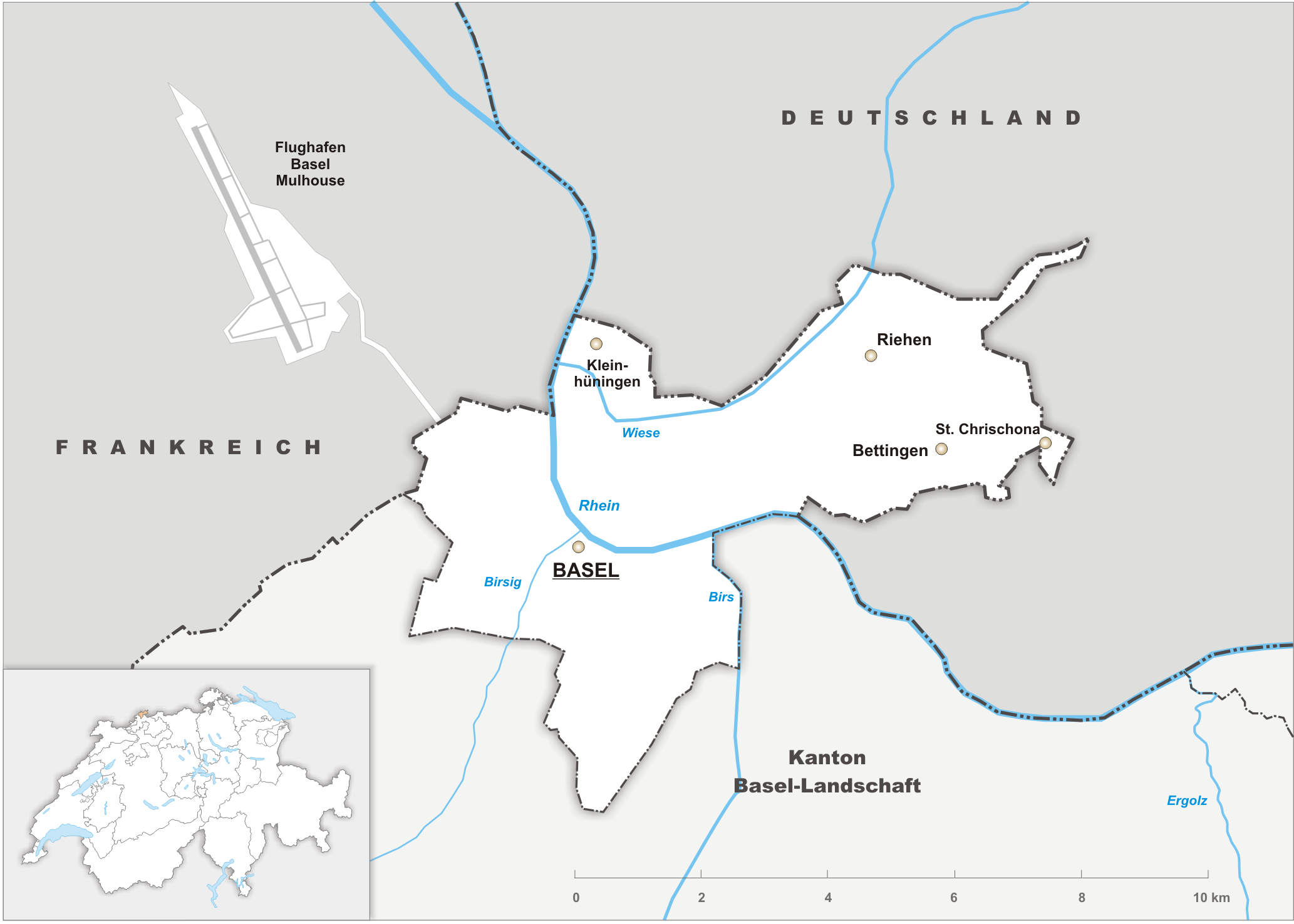 Karte des Kanton Basel-Stadt.